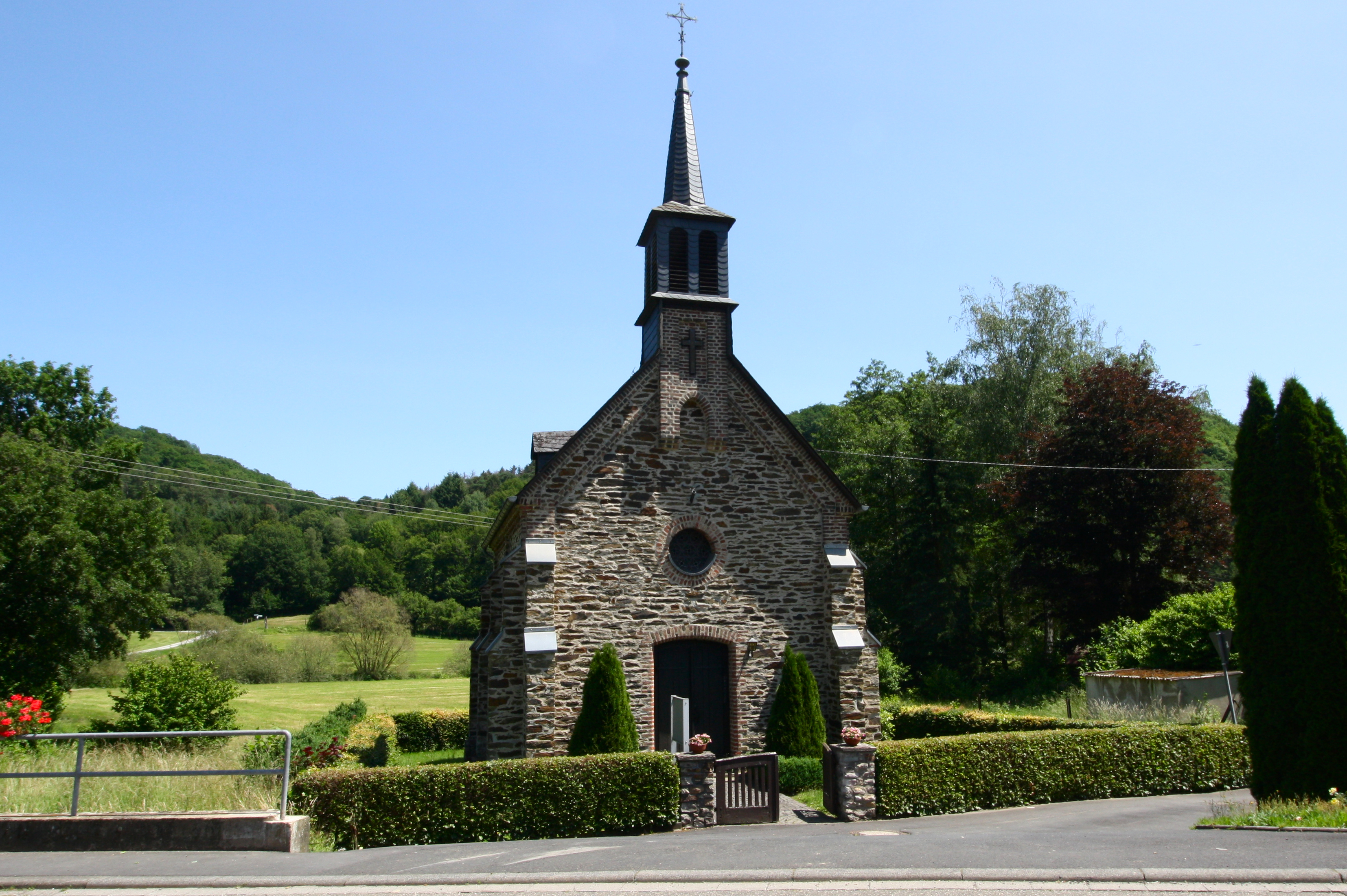 St. Antonius, Bladernheim, Ortsteil von Montabaur, Westerwald, Rheinland-Pfalz, Deutschland